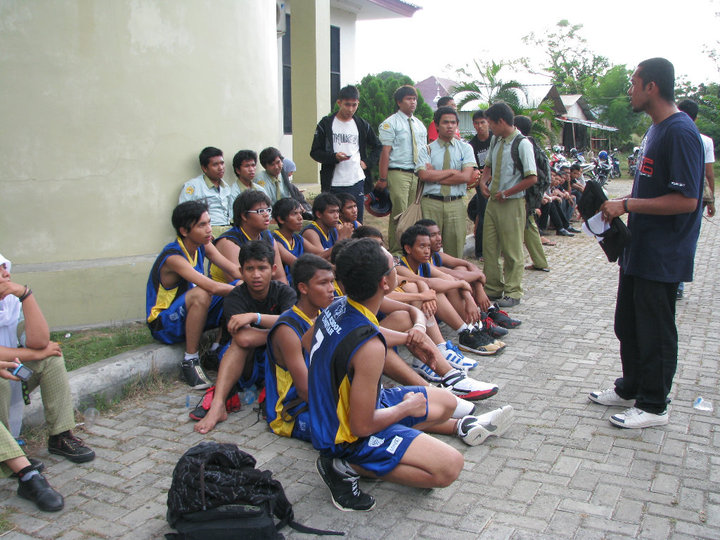 Tim Basket SMA Labschool Unsyiah